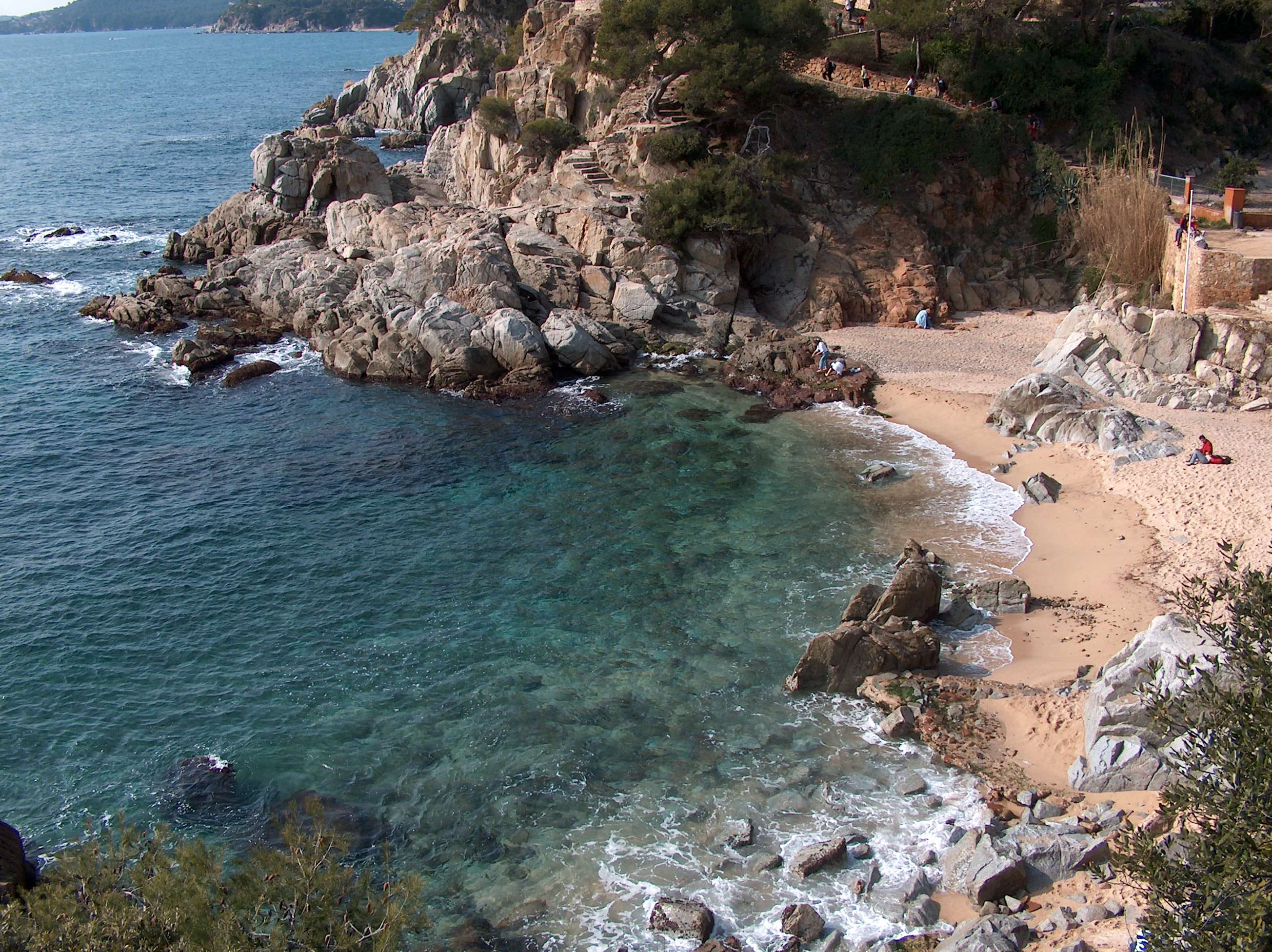 Cala d'en Trons (Lloret de Mar) This is a a photo of a beach in Catalonia, Spain, with id: PL-CT-17003-142